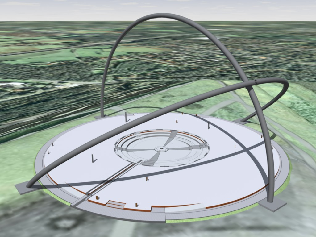 Computerstudie des Horizontobservatoriums auf der Halde Hoheward - endgültiger Planungsstand 2007